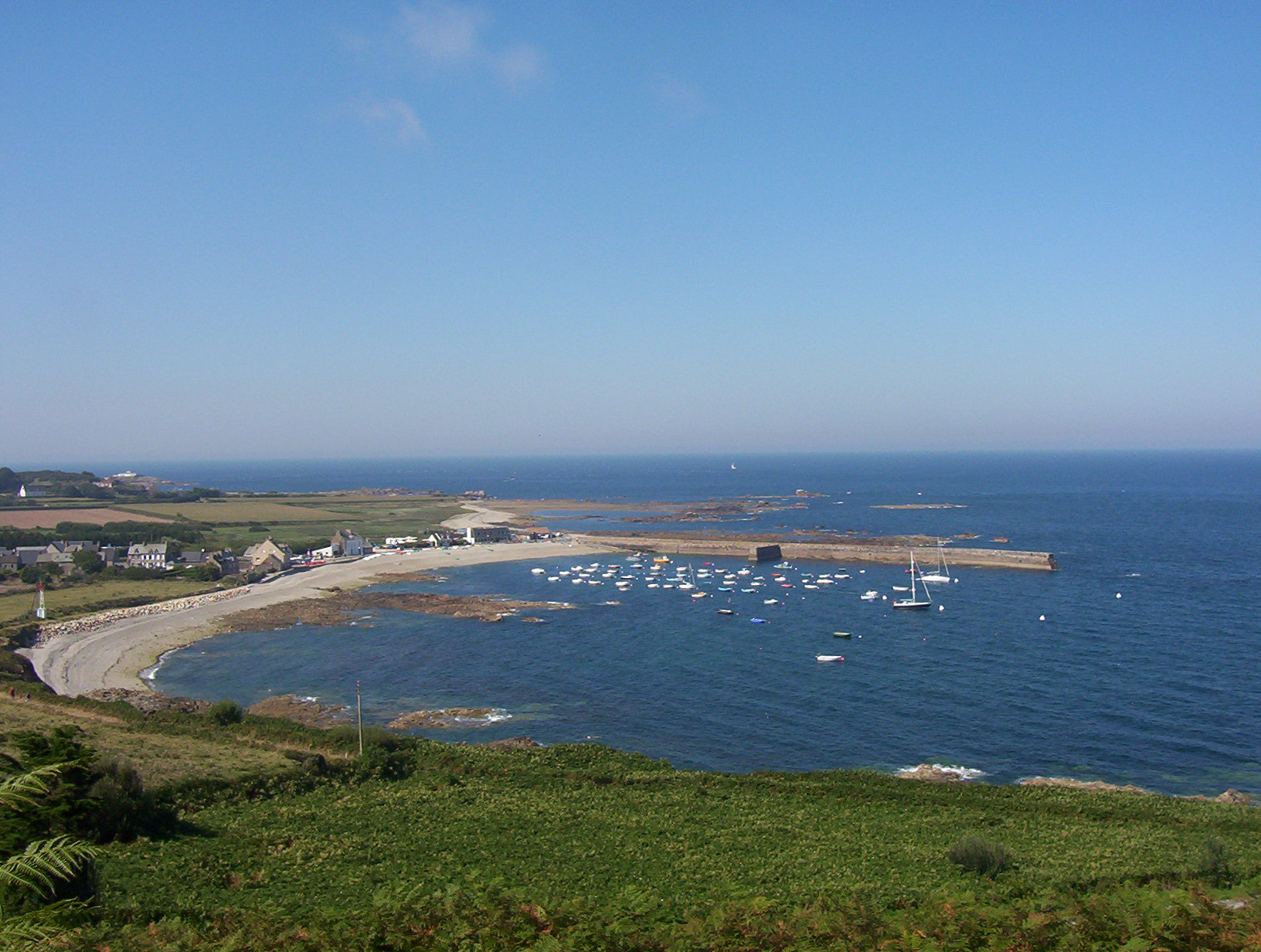 Port du Hâble d'Omonville-la-Rogue vu depuis le Fort.